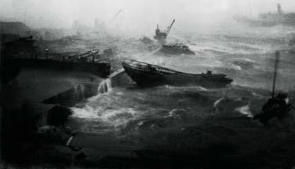 中文（香港）: 1906年9月18日香港丙午風災中，風速驚人，遍海皆白頭浪；明報轉載香港海事博物館。